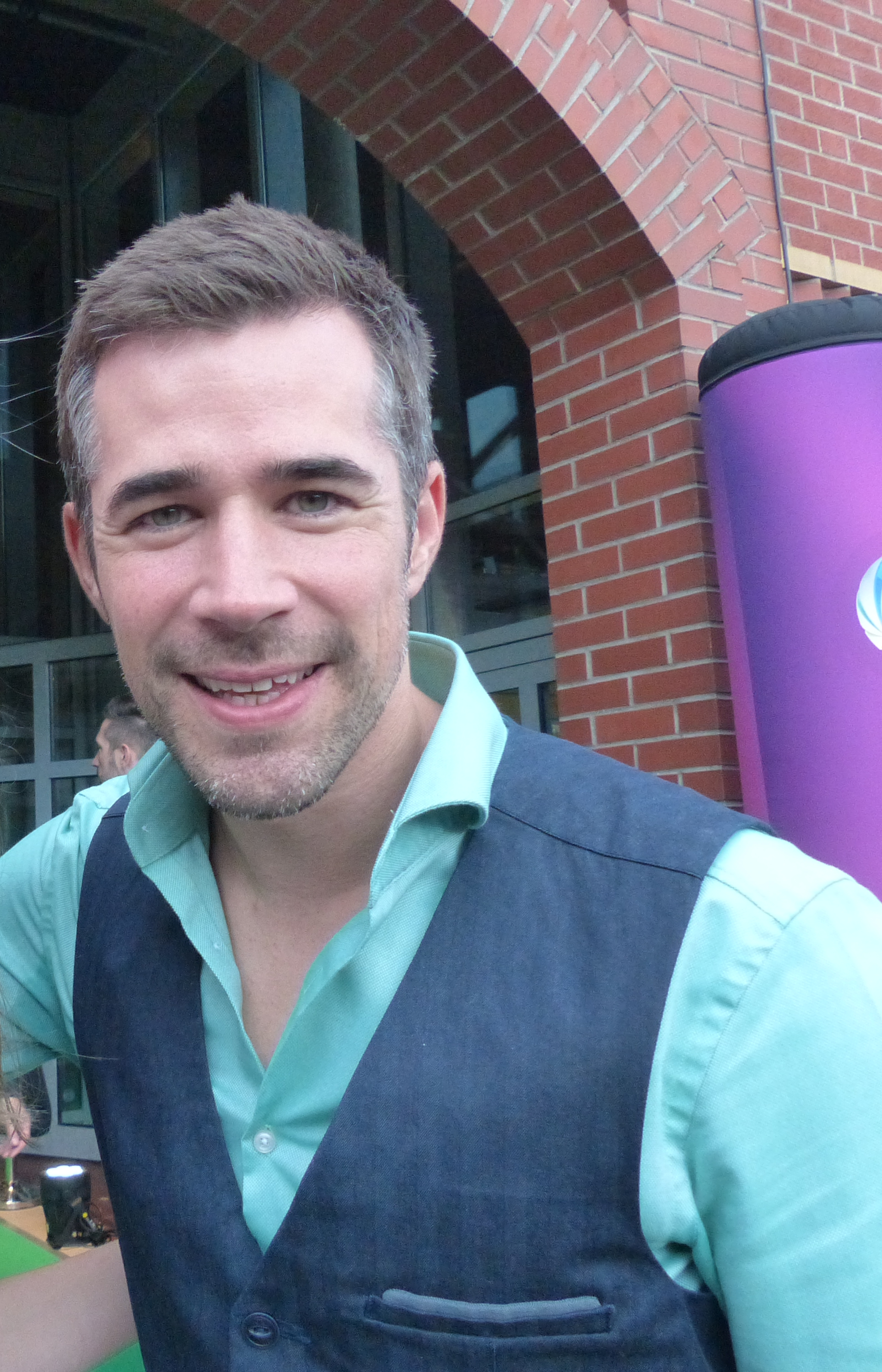 Jo Weil bei der Shrek - Das Musical Premiere, 19.10.'14, Düsseldorf